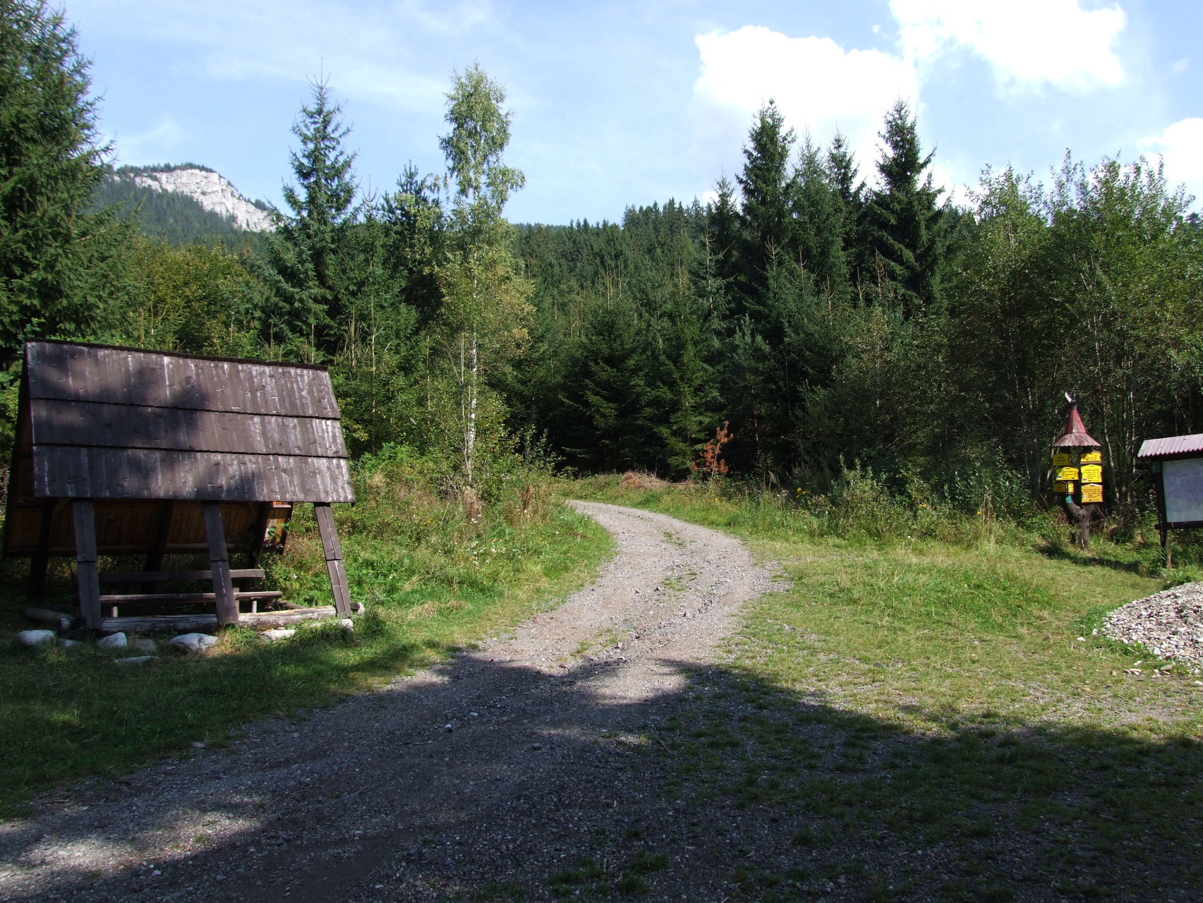 Rozdroże pod Tokarnią (wylot Doliny Jałowieckiej)